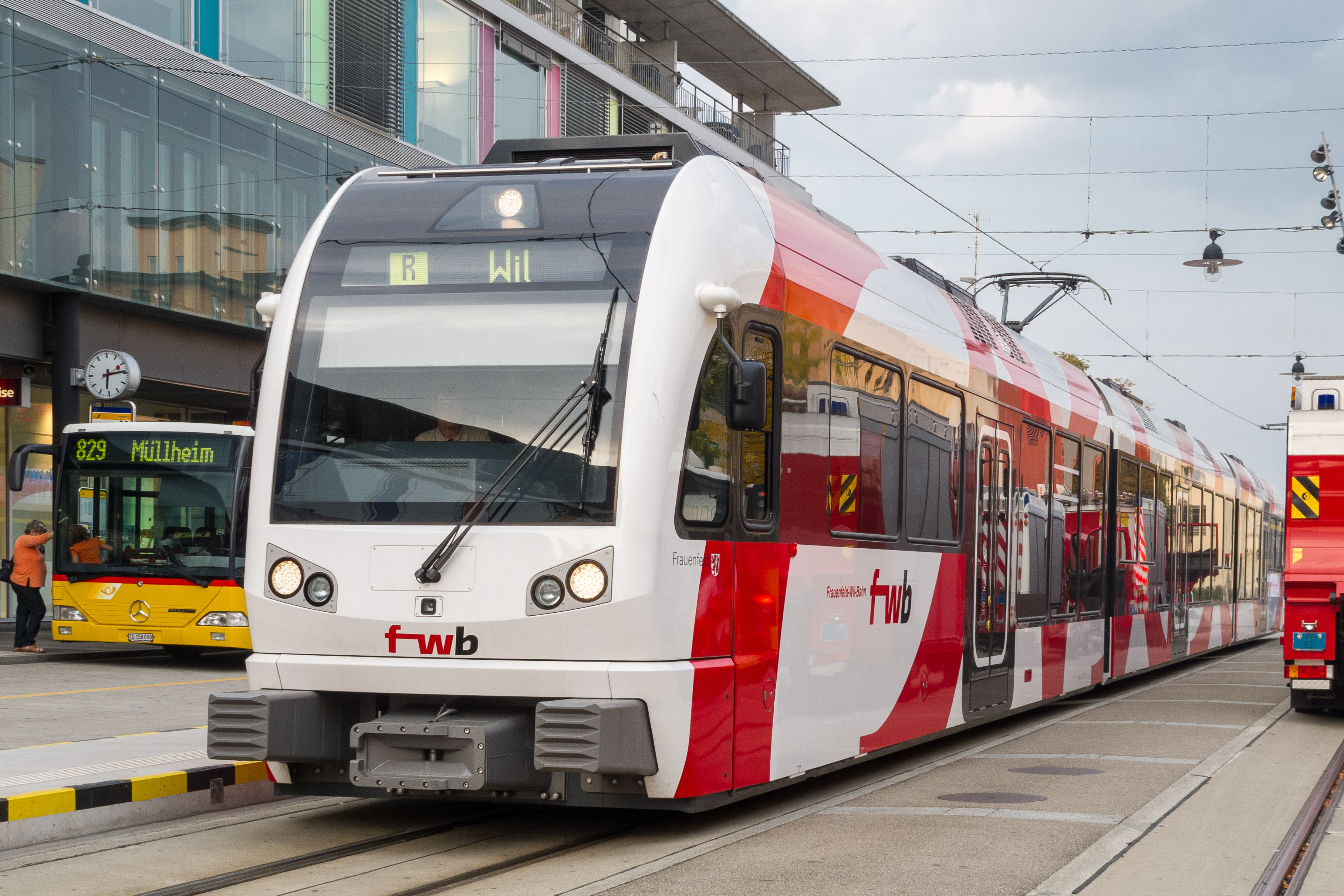 ABe 4/8 "Frauenfeld" der Frauenfeld-Wil-Bahn in Frauenfeld